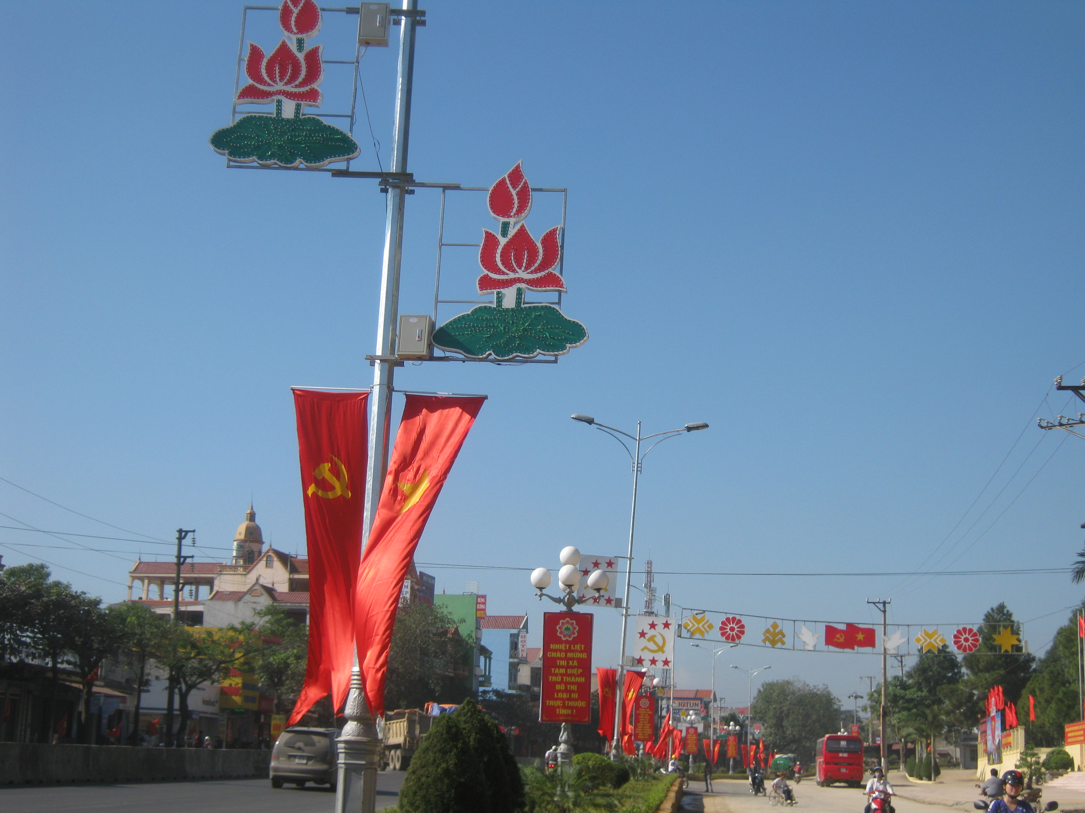 Phong cảnh đô thị Tam Điệp, Ninh Bình